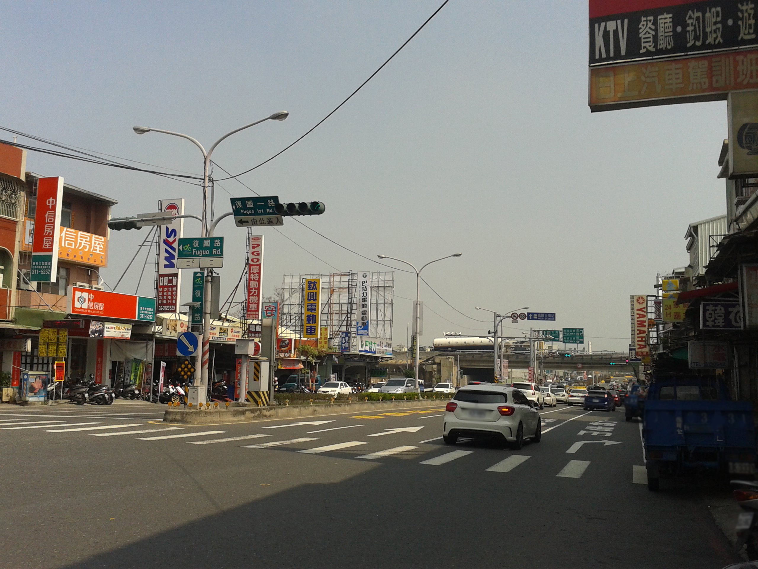 市道180號進入永康區後更名為復興路。圖為復興路景一隅，遠處是大灣交流道。